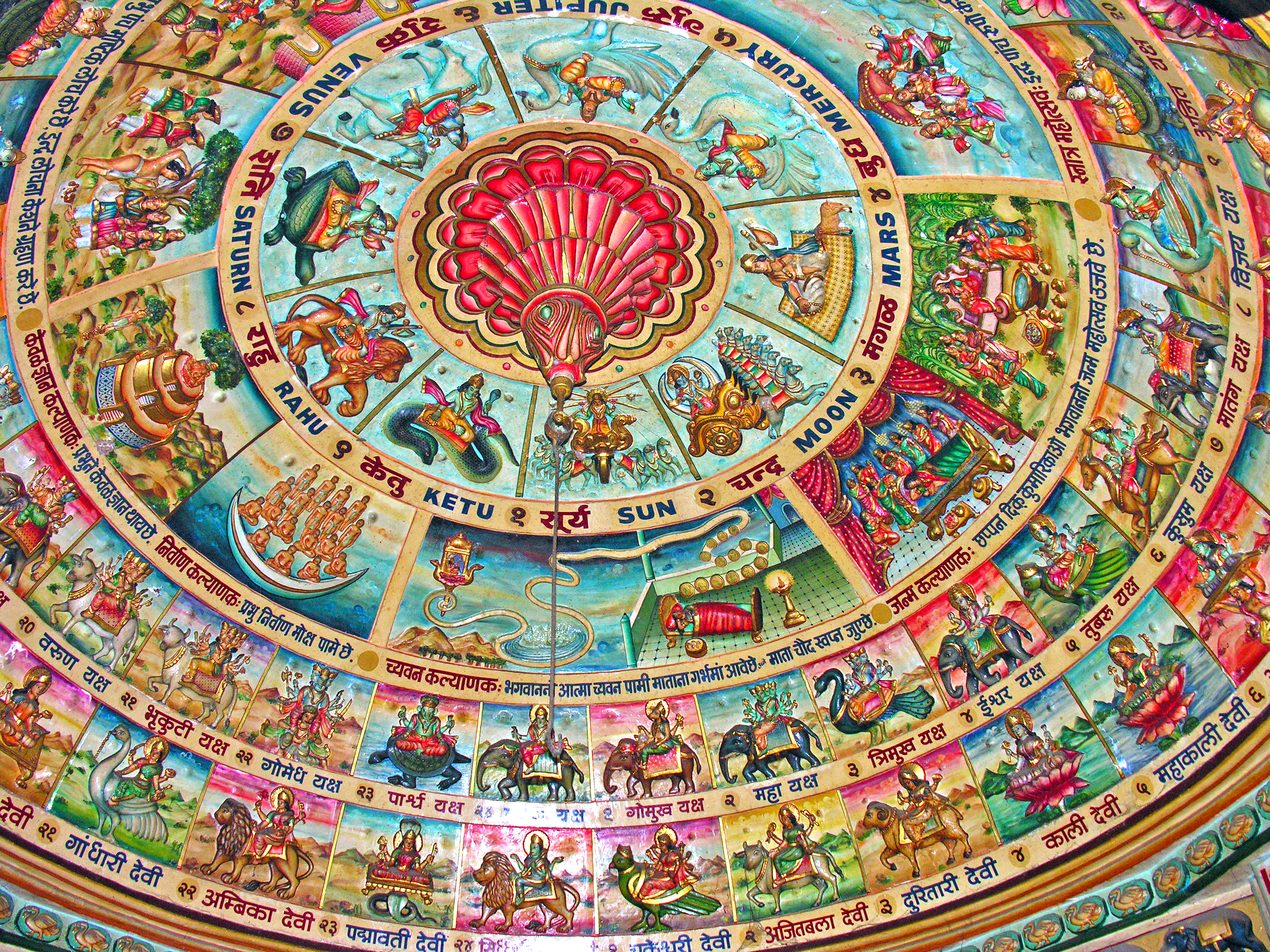 India-7810